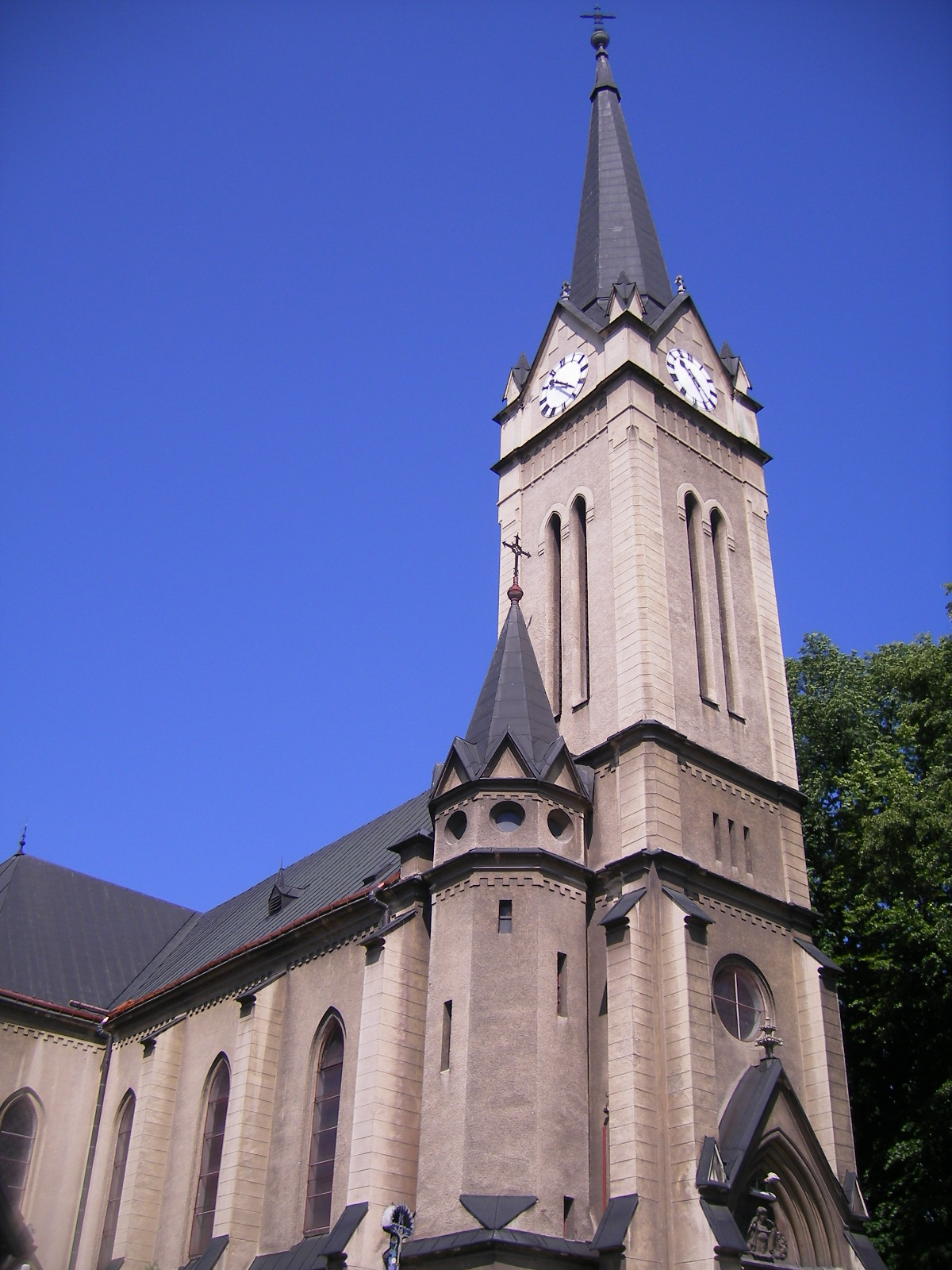 Vrútky - katolícky kostol